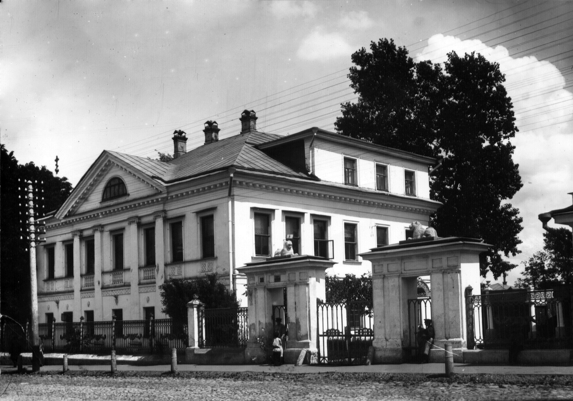 Усадьба Рябининой в Нижнем Новгороде на улице Ильинской. 1910 год